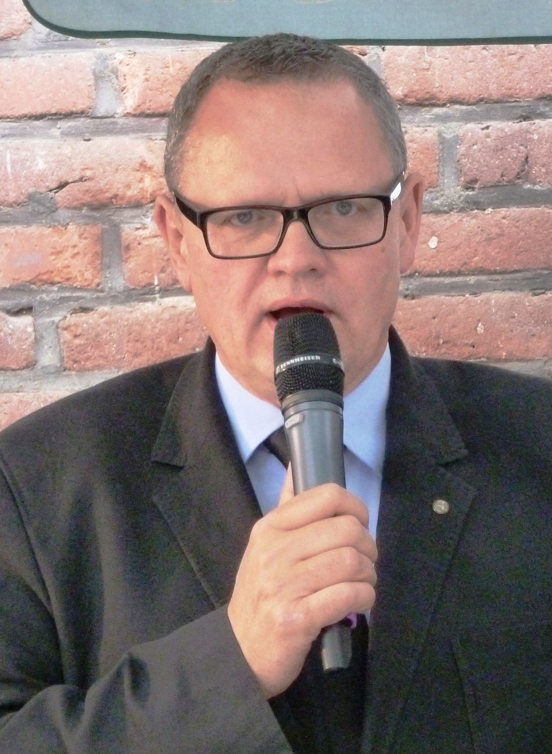 Tour de Magellan 2014, Gut Eltzhof in Köln, Ulrich Potofski